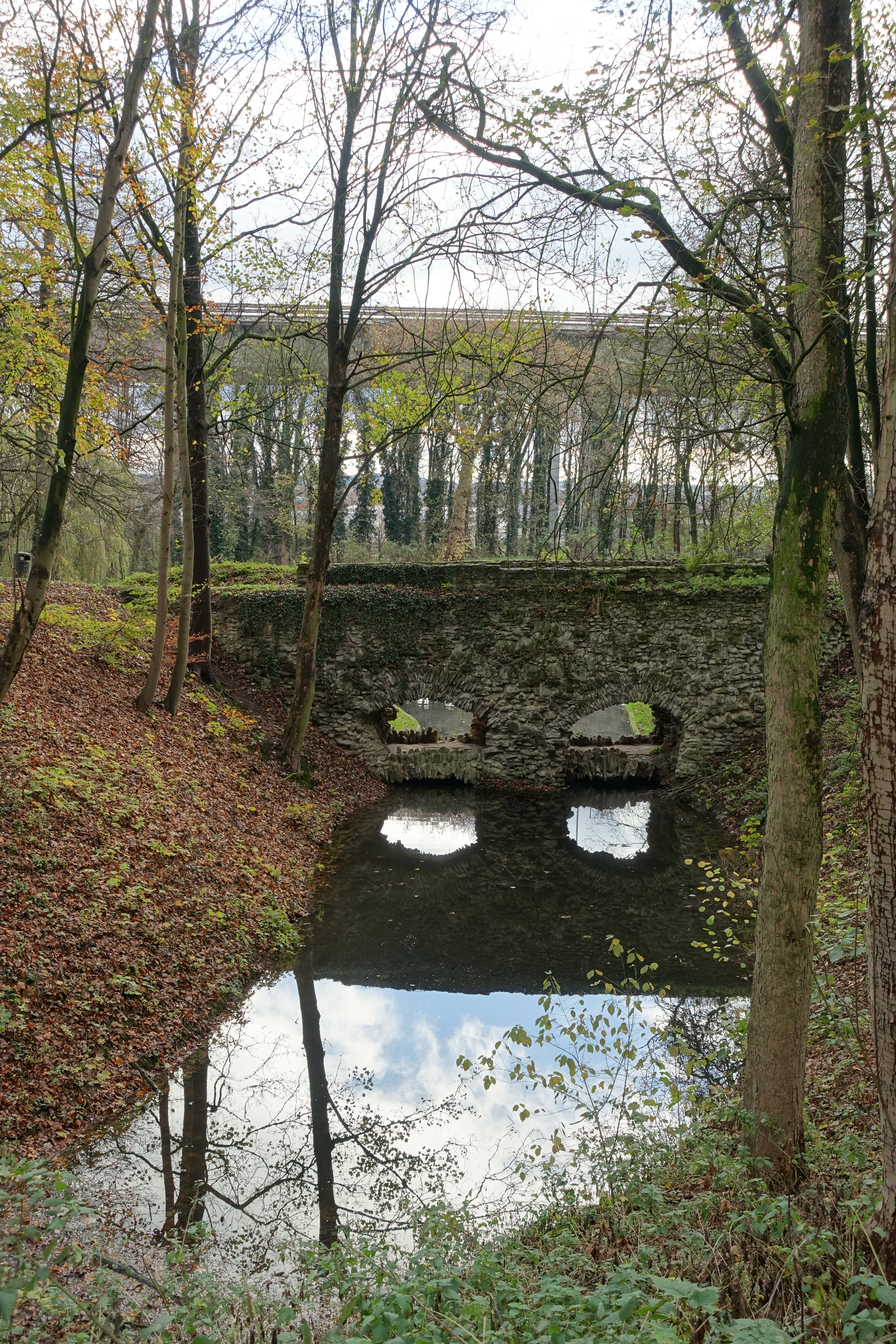 Bloedgrotten in Domein Drie Fonteinen, vanuit het noorden